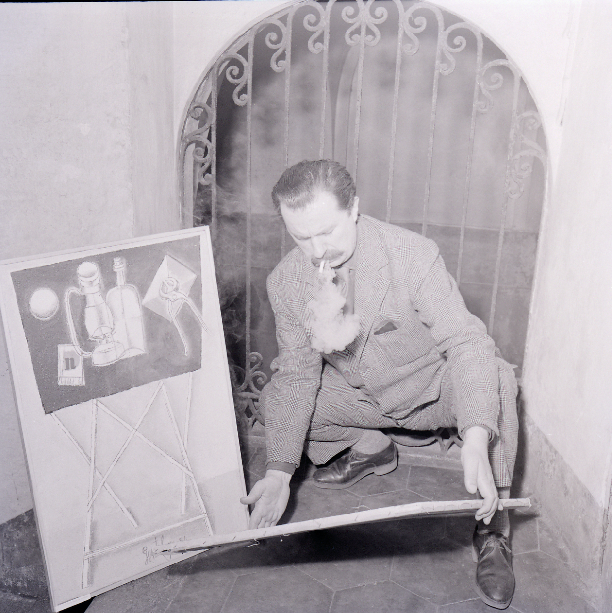 Servizio fotografico : Italia, 1982 / Paolo Monti. - Buste: 24, Fototipi: 25 : Negativo b/n, gelatina bromuro d'argento/ pellicola ; 6x6. - ((Serie costituita da 24 buste di carta, tenute insieme da una graffetta, identificate con la numerazione: R4329, R4330, R4331, R4332, R4333, R4334, R4335, R4336, R4337, R4338, R4339, R4340, R4342, R4343, R4344, R4345, R4346, R4347, R4348, R4349, R4350, R4351, R4352. - Sulla busta R4329: "Gentilini". - , presso Archivio Paolo Monti. - Fonte: Rubrica di Paolo Monti: Archivio 10x12 (ultimi numerati) - dal G1 al (s.d.)